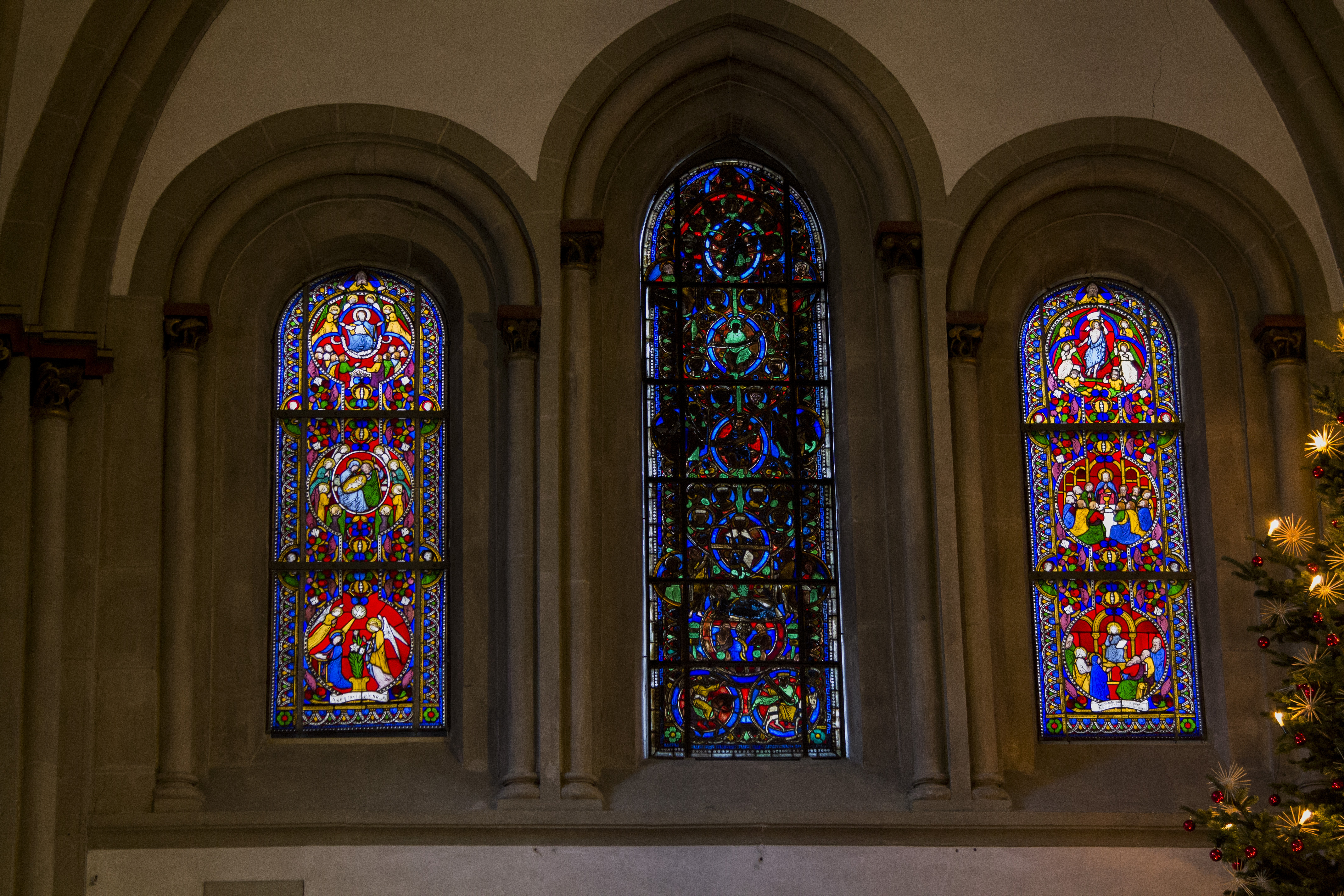 Chorfenster in Legden, St. Brigida, aus der Zeit um 1230.